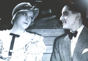 Lina Gennari e Carlo Pietrangeli in "Treno popolare" (Matarazzo, 1933)